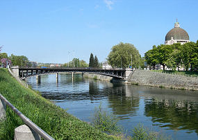 pont de fetinne